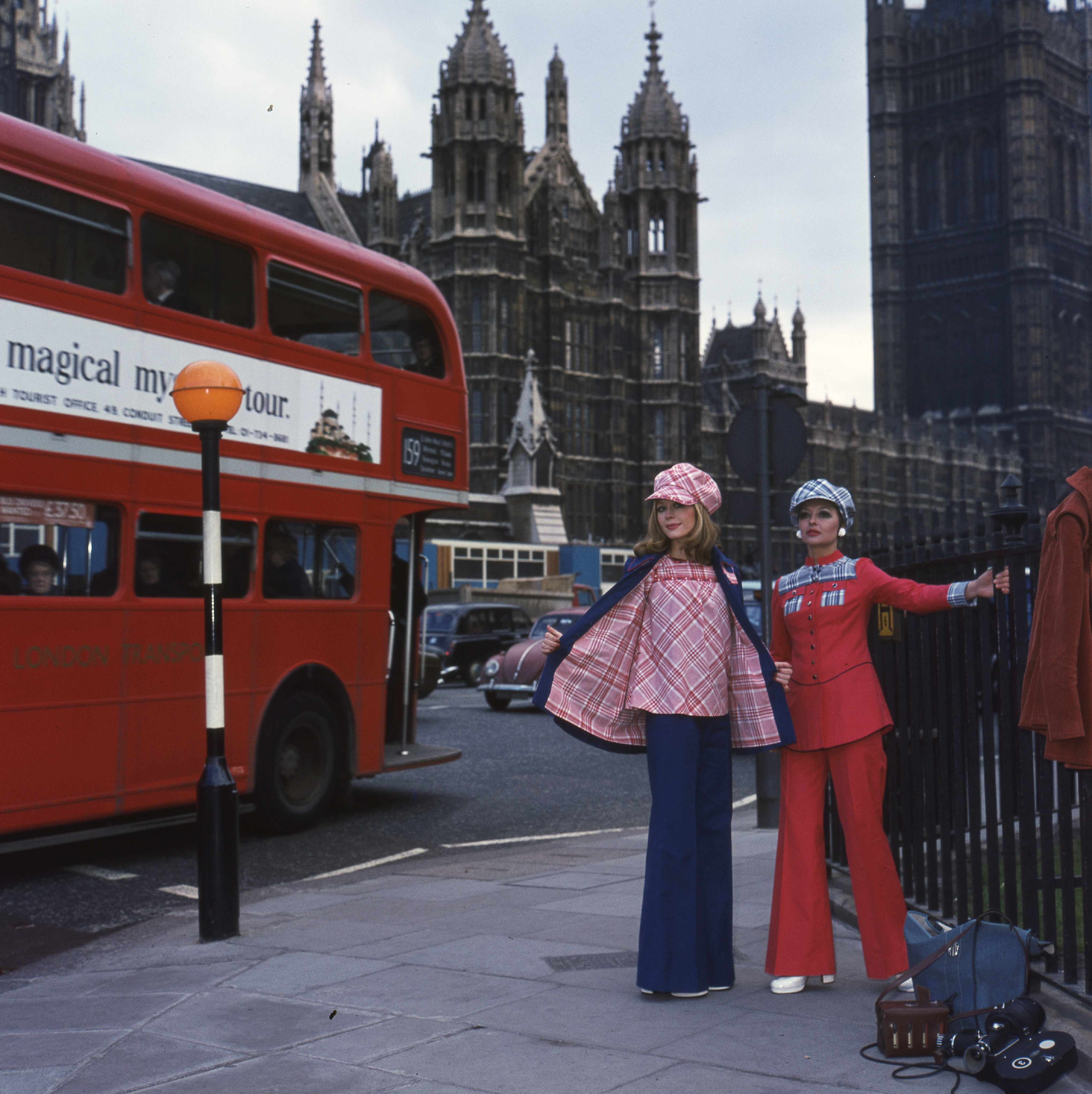 Parliament square a St. Margaret street torkolatánál, szemben a Westminster-palota. Balra Fekete Klári manöken. Location: United Kingdom Tags: bus, double-decker, colorful, church, fashion Title: Parliament square a St. Margaret street torkolatánál, szemben a Westminster-palota. Balra Fekete Klári manöken.